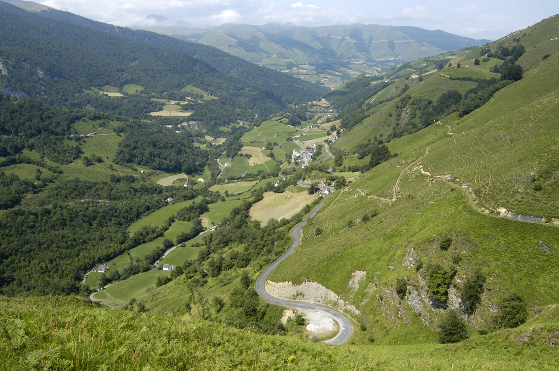 Vista general del pueblo de Sainte-Engrâce (Pirineos Atlánticos, Francia).